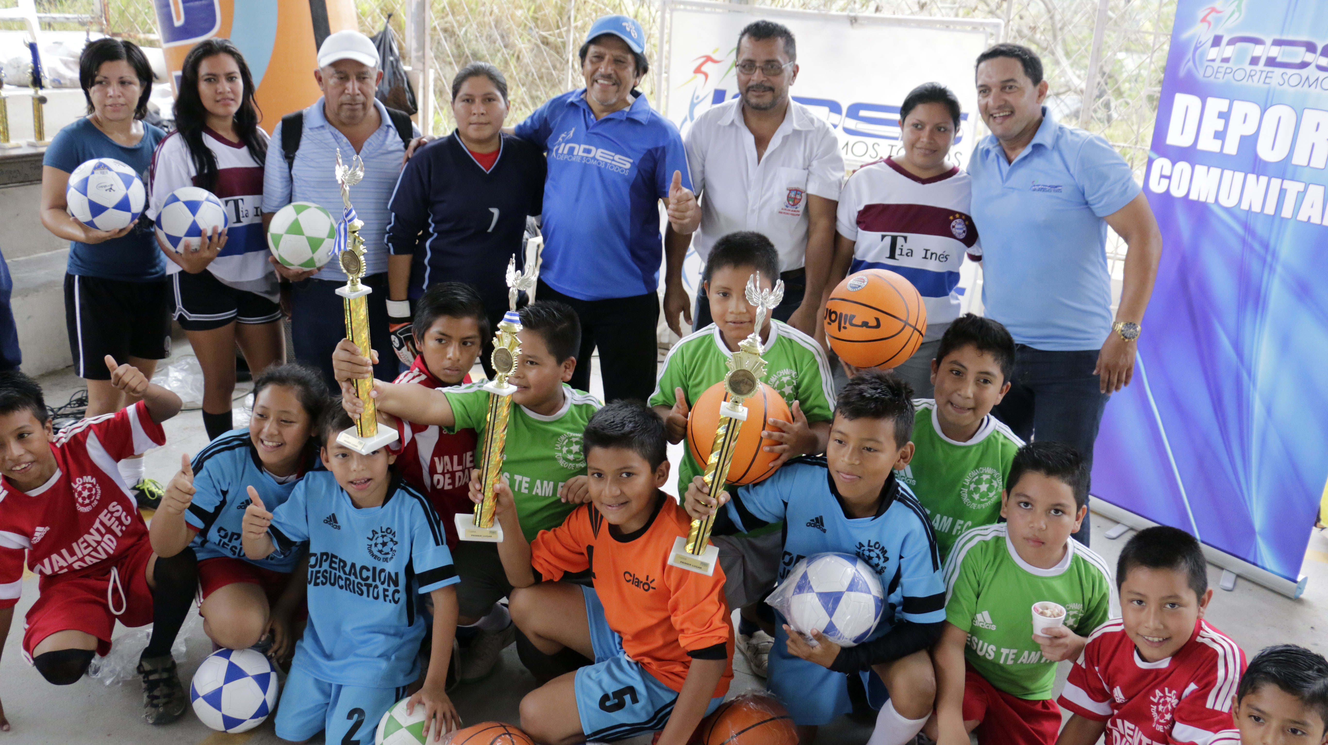 Apoyando el deporte.